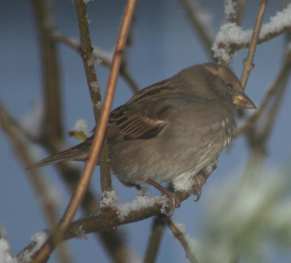 Gråsporv ho.